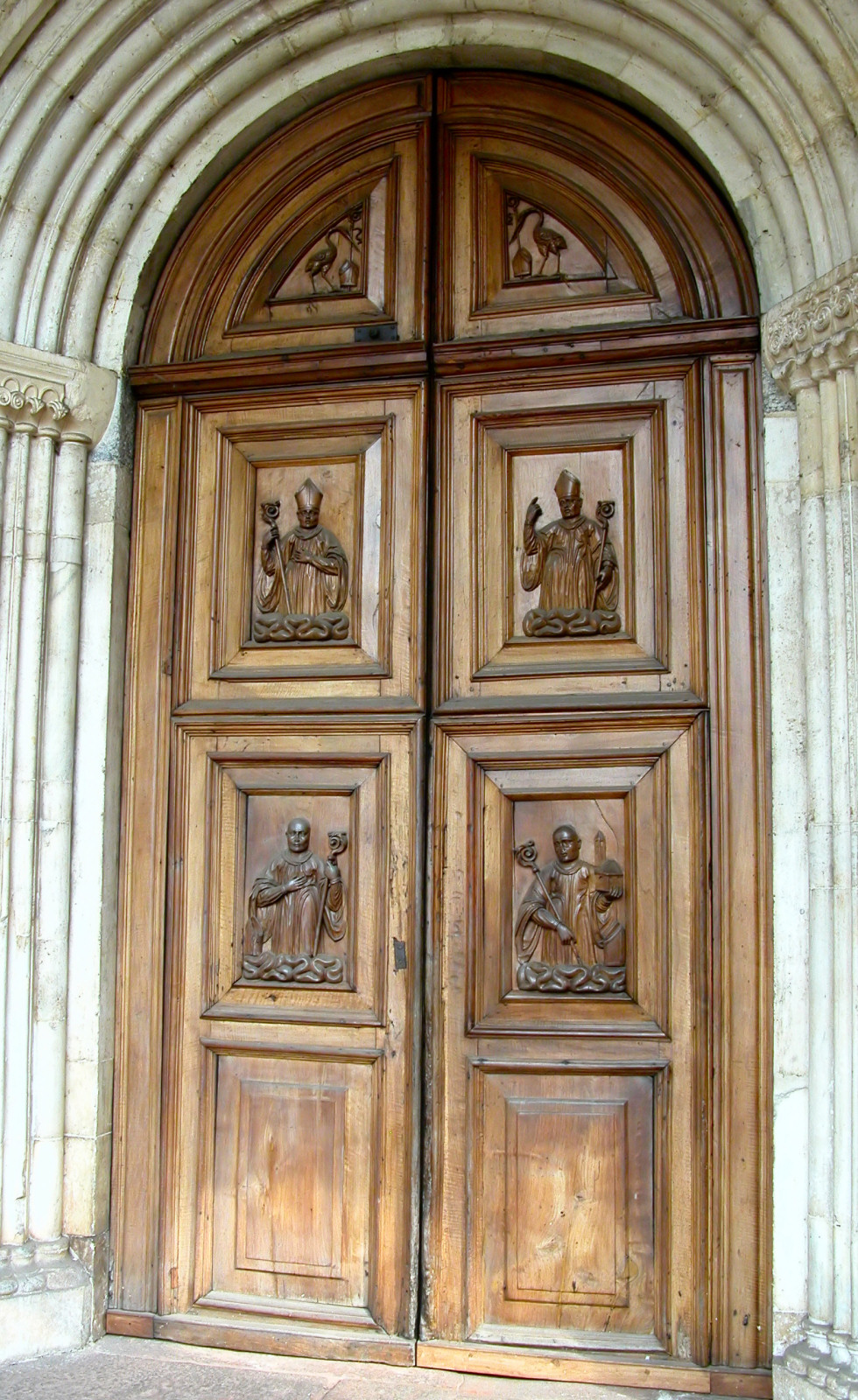 Il portale dell'Abbazia di Chiaravalle a Milano, risalente presumibilmente agli inizi del XVI secolo, scolpito in rilievo con le figure dei Quattro Santi (san Roberto, sant'Alberico, santo Stefano, san Bernardo) e sormontato dallo stemma della chiesa: la cicogna con pastorale e mitria, anch'essa scolpita sui battenti. Foto da me realizzata.